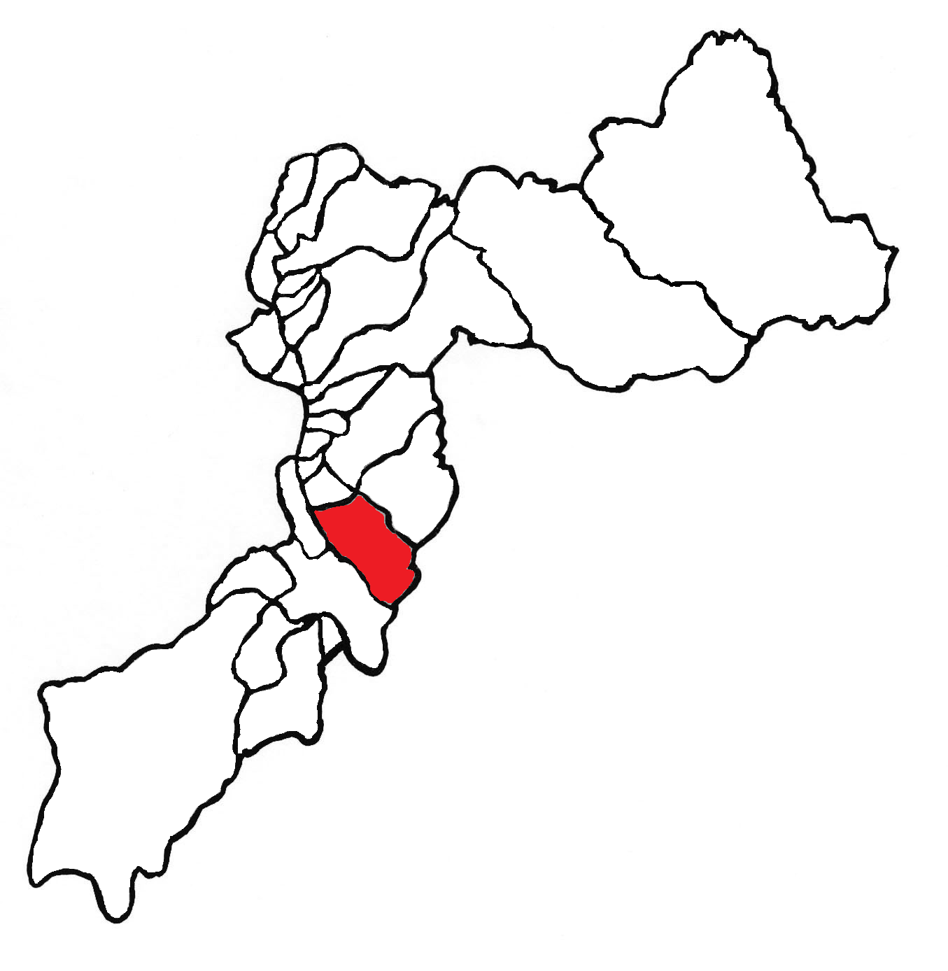 Ubicación del distrito en la provincia de Huancayo, departamento de Junín, Perú